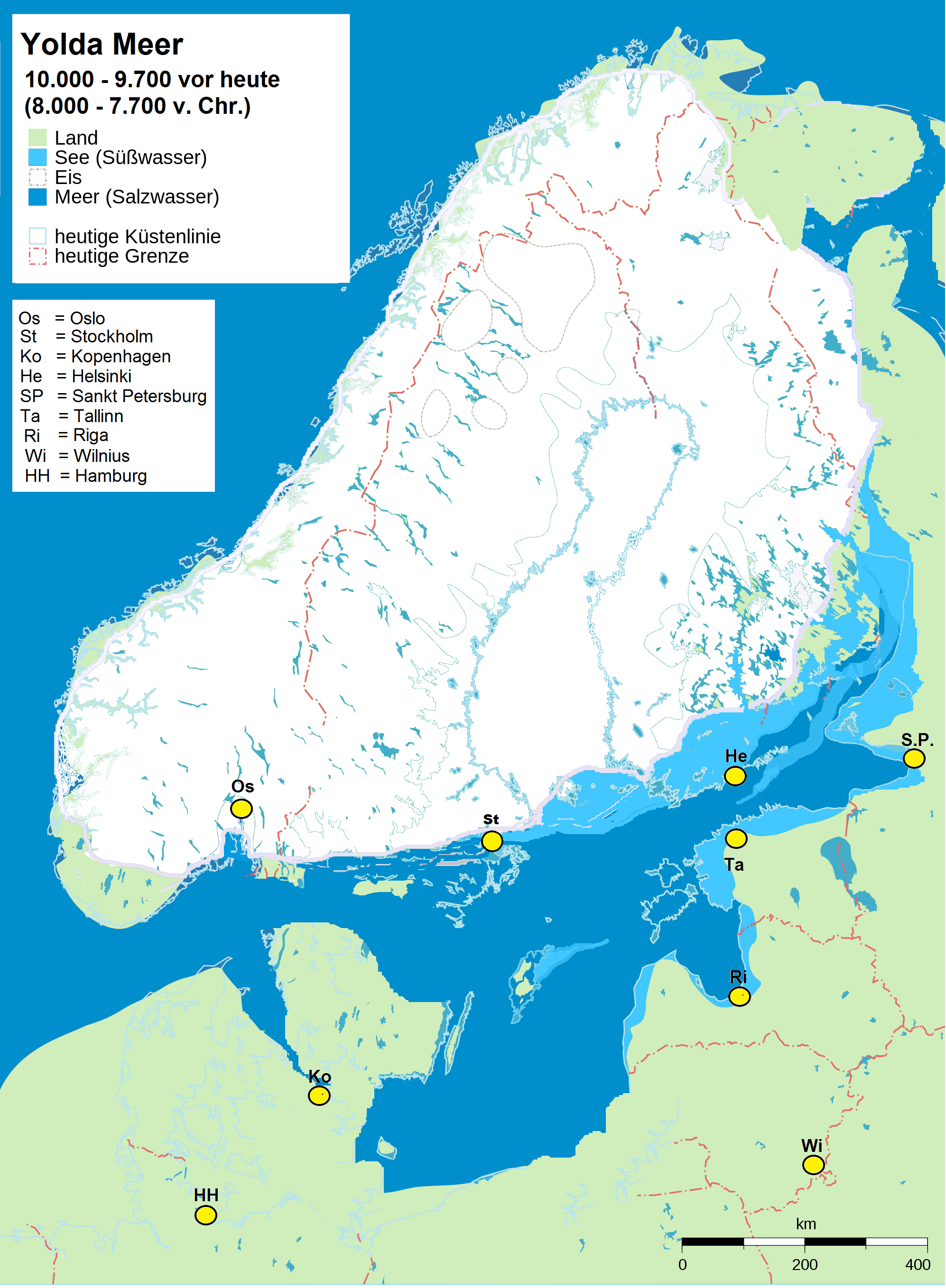 Brackwassersee als Vorläufer der Ostsee vor 10.000 Jahren